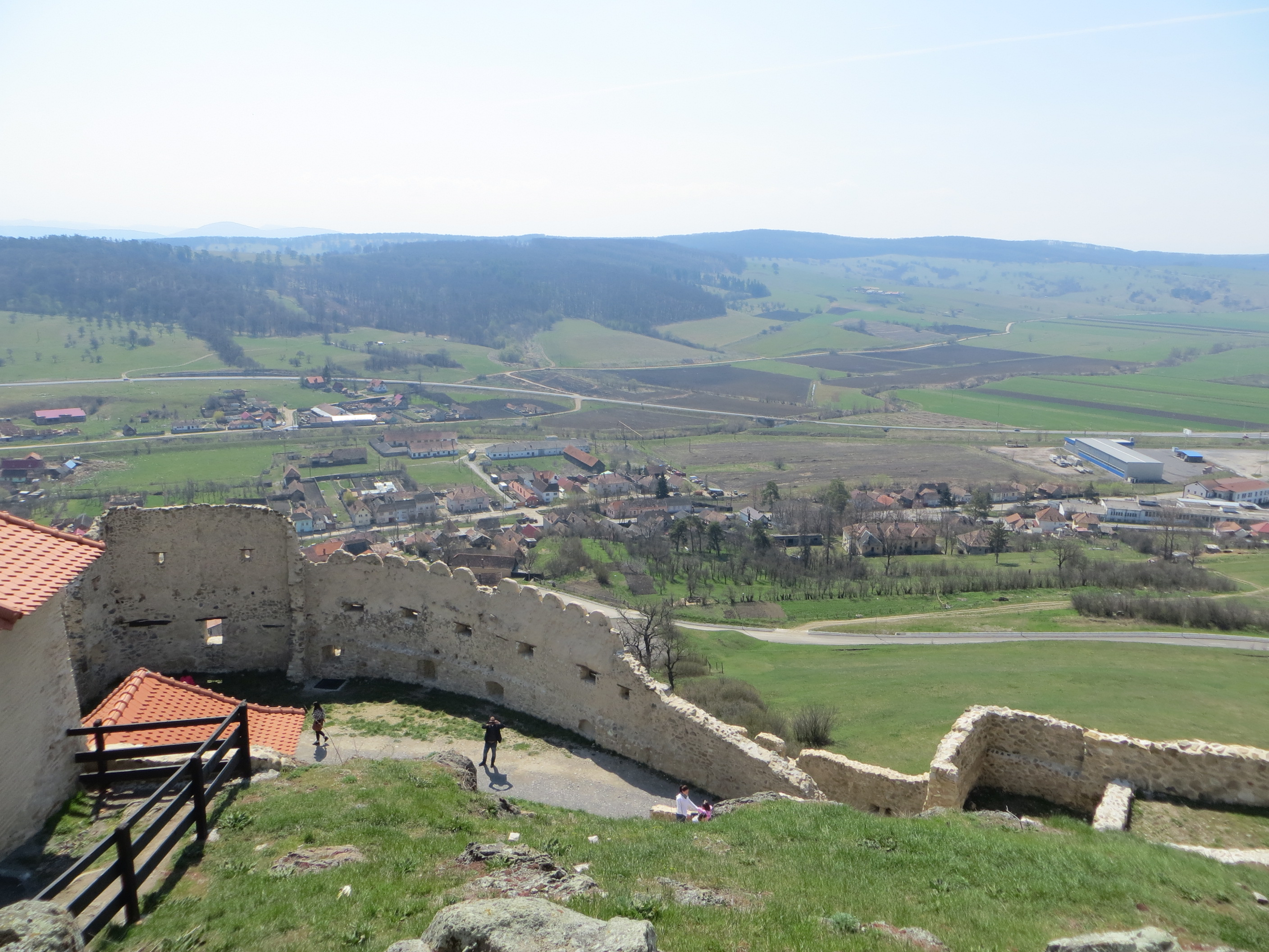 Incinta mediană a Cetății Rupea, cu turnuri și încăperi pentru provizii 02